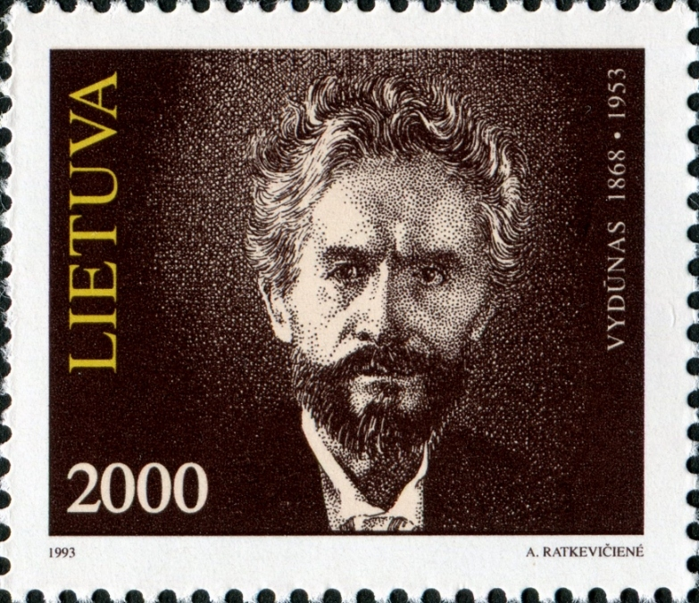 Vydūnas